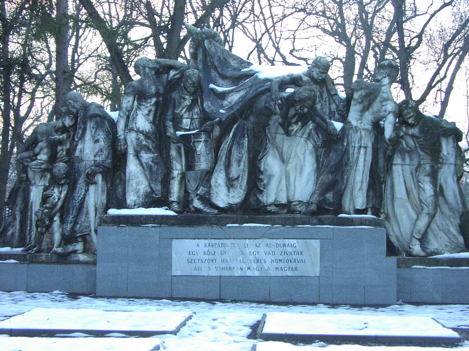 A dombóvári szoborpark részlete. (Saját felvétel [1/a])